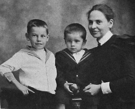 Photograph of Jan Hendrik Hofmeyr (born 1894), his brother AB and his mother Deborah when Jan was about 4 years old (i.e. about 1898)